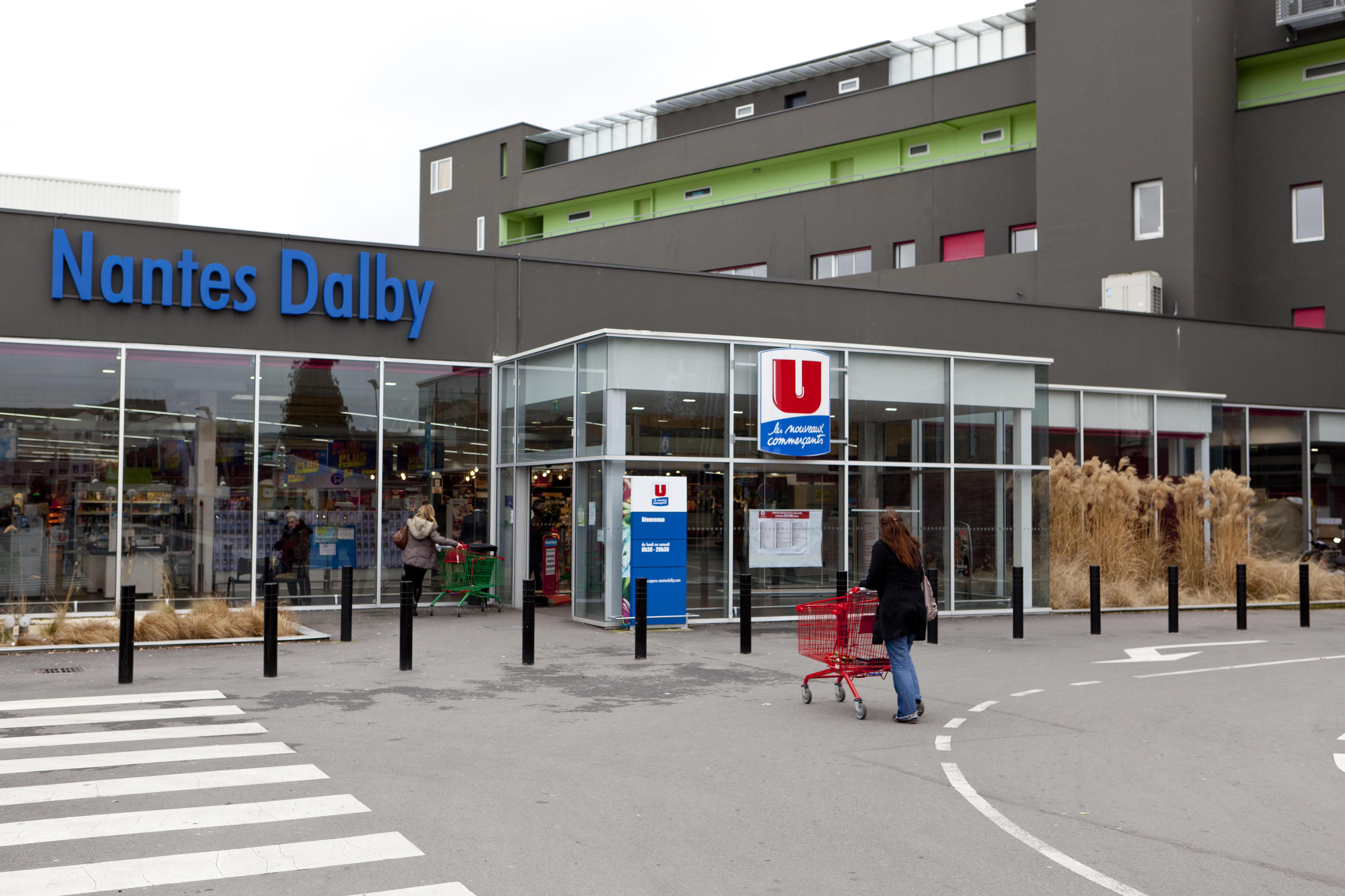 Super U Nantes Dalby